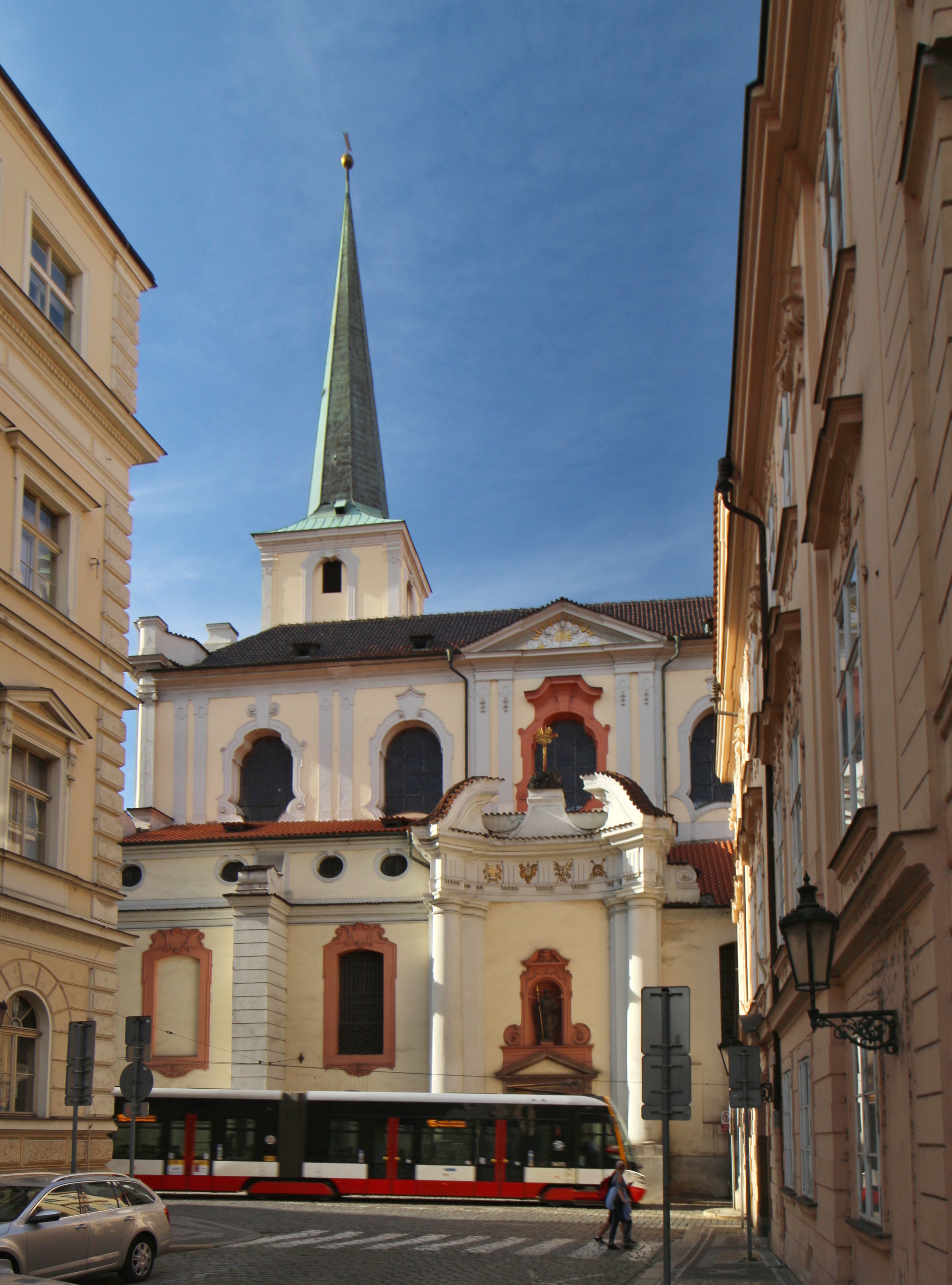 Malá Strana, kostel sv. Tomáše